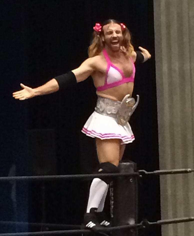 レディ・ビアード ユニオン大阪大会にて